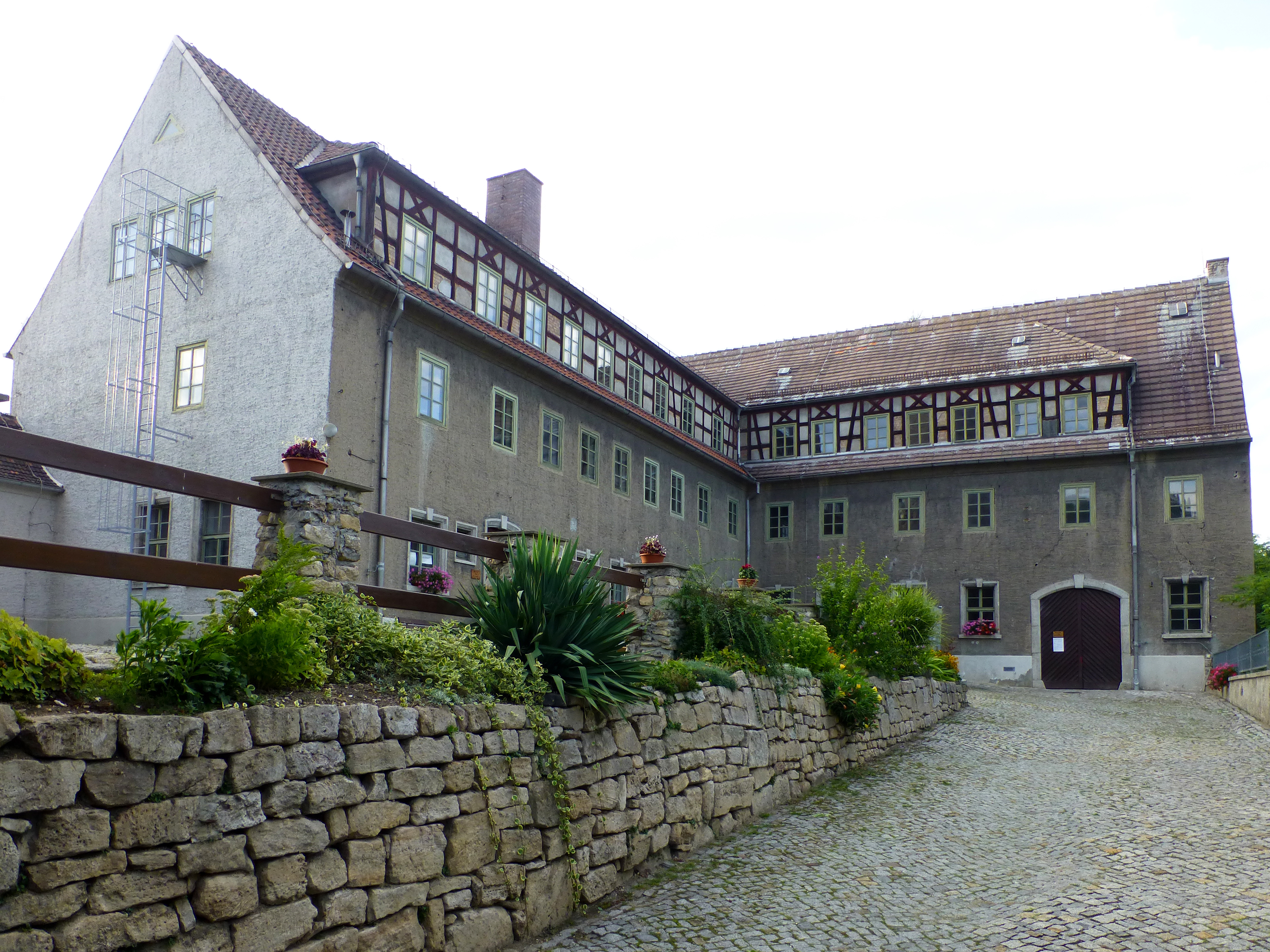 Burg Camburg; Burggebäude vom Burgtor aus gesehen